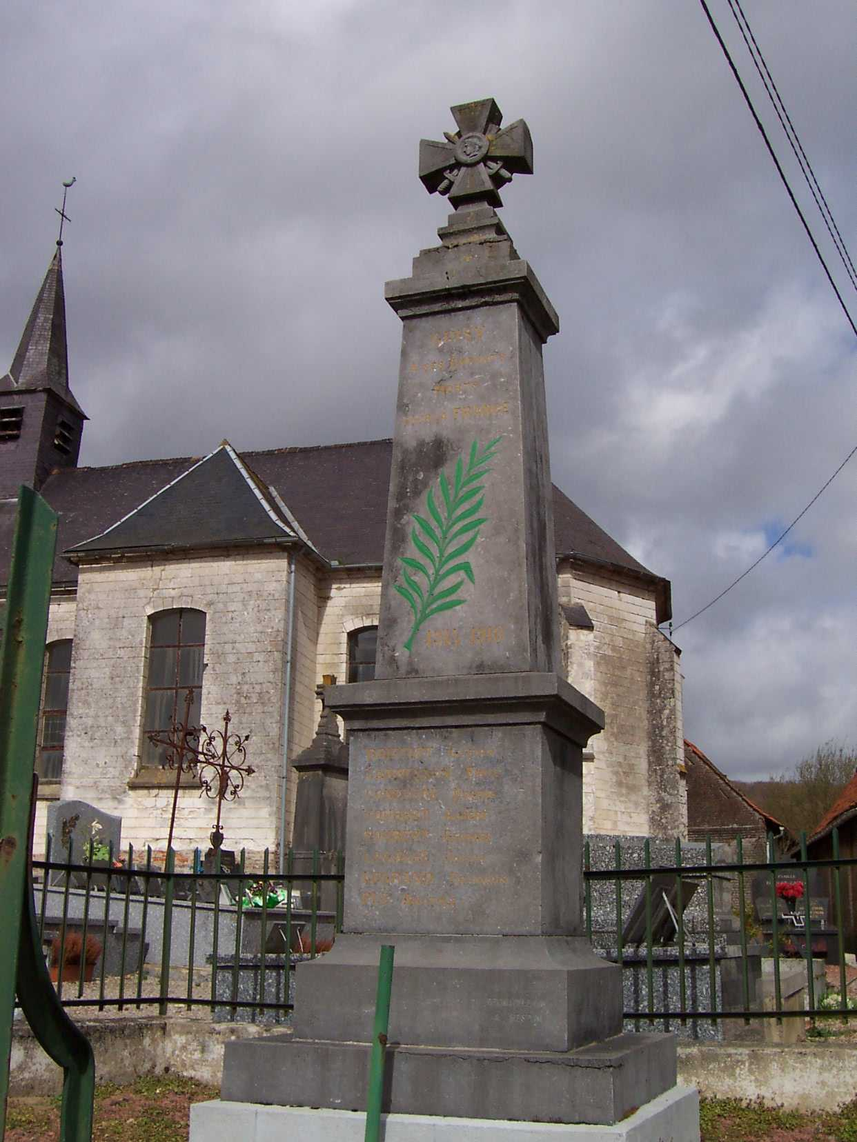 Monument aux mort de Guisy